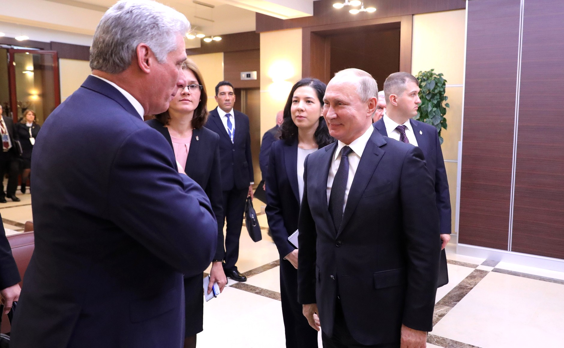 Переговоры Президента Российской Федерации Владимира Путина с Президентом Республики Куба Мигелем Диас-Канелем Бермудесом